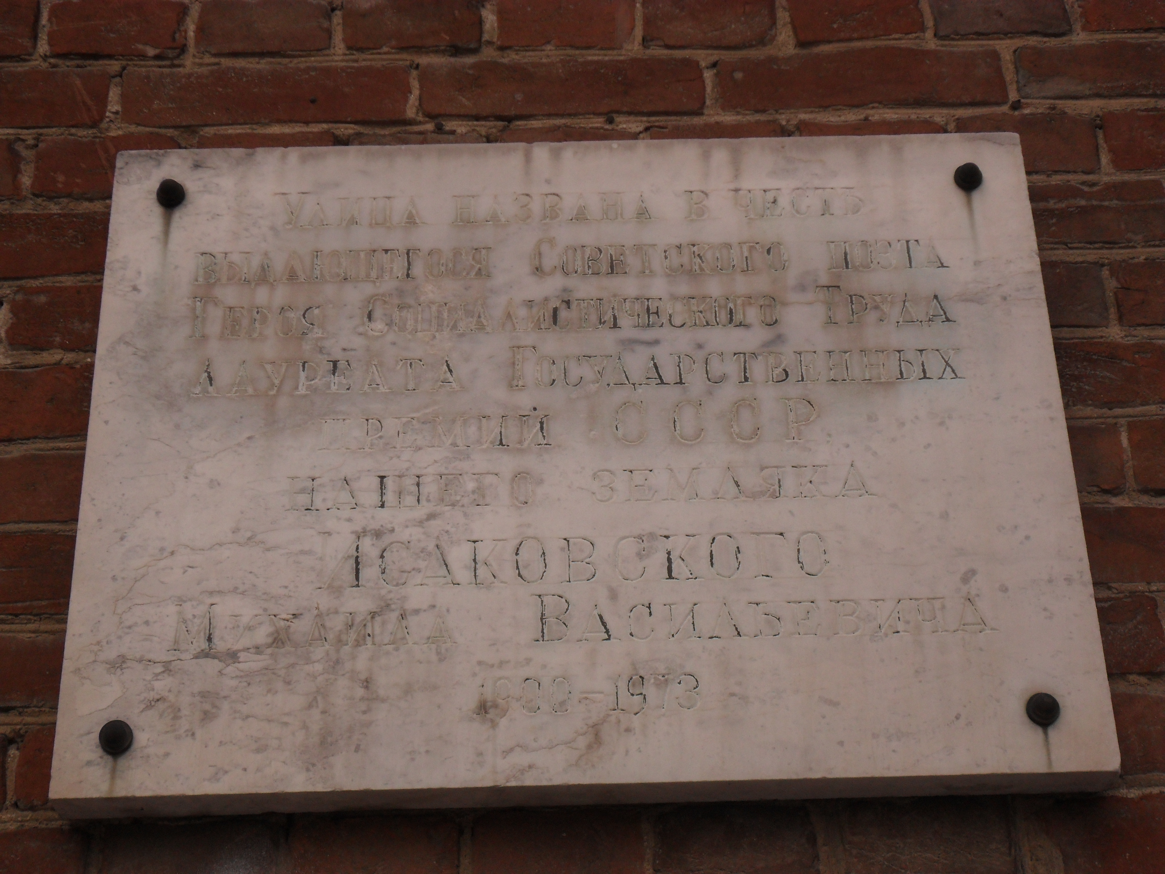 Аннотационная доска поэту Михаилу Исаковскому на названной в его честь улице в Смоленске.